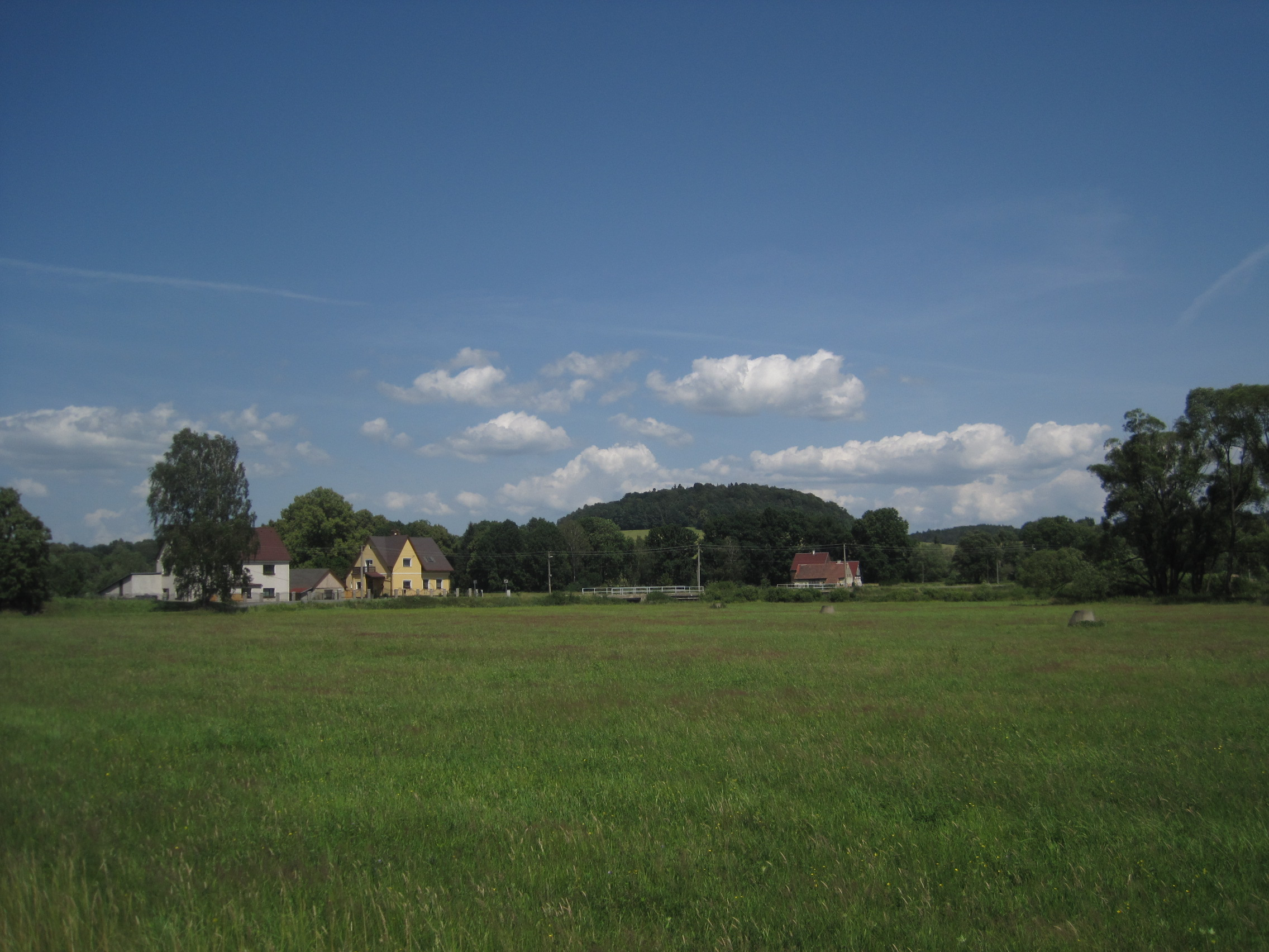 Předlánce, niva Smědé a vrch Hradec (Astberg, 313 m) od višňovského nádraží